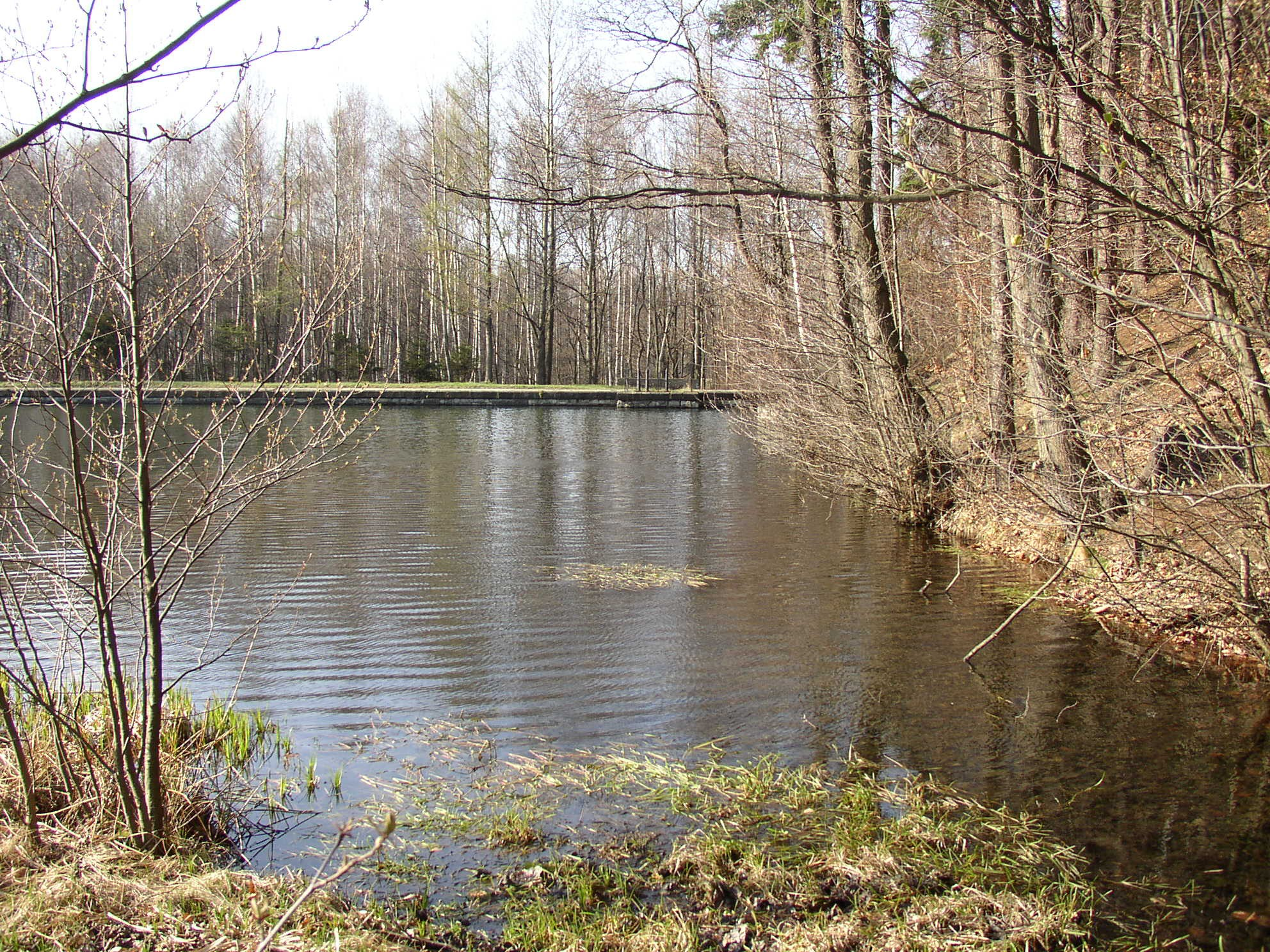 Lesenská přehrada